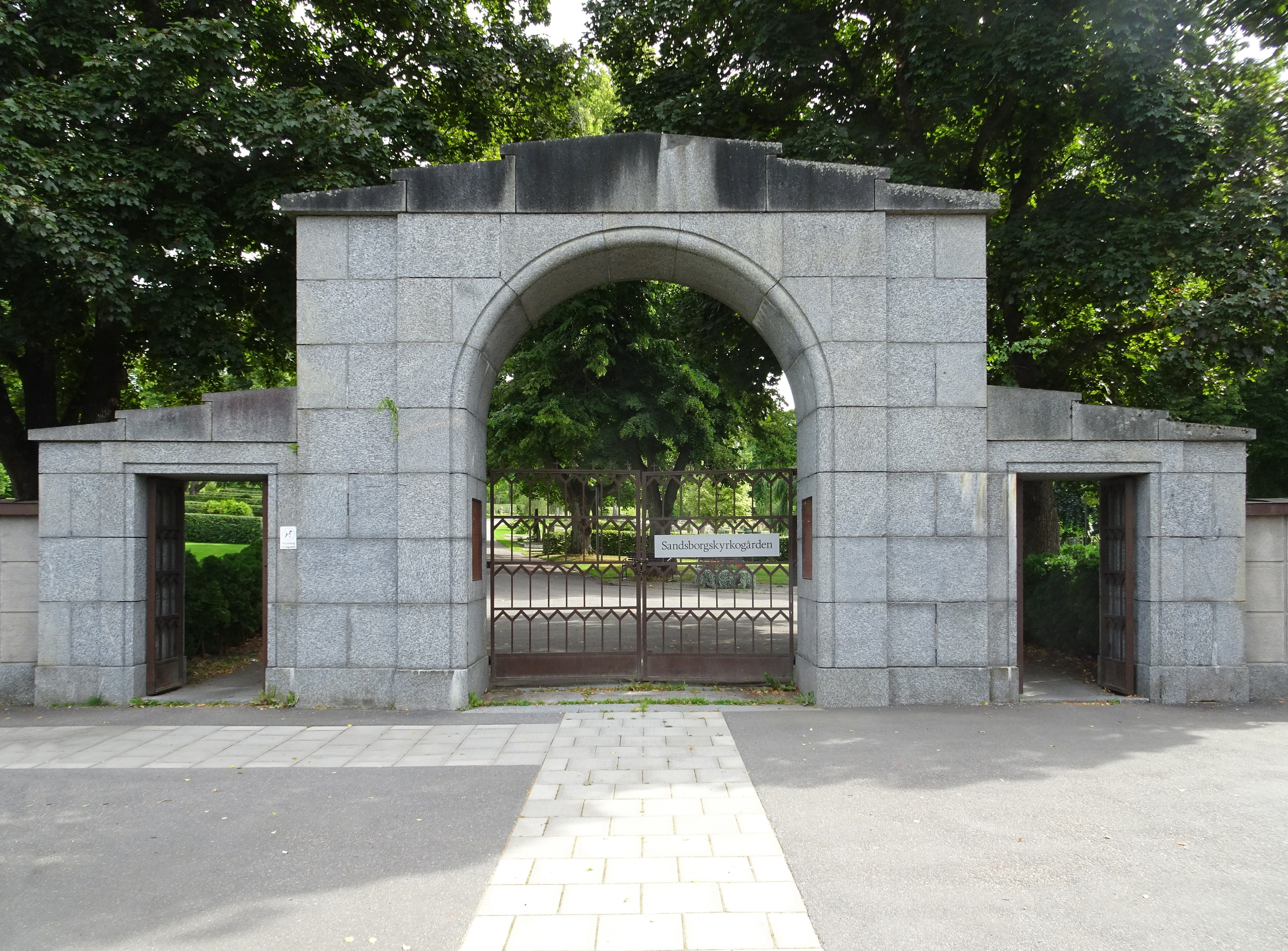 Sandsborgskyrkogården, huvudentré, arkitekt Lars Israel Wahlman